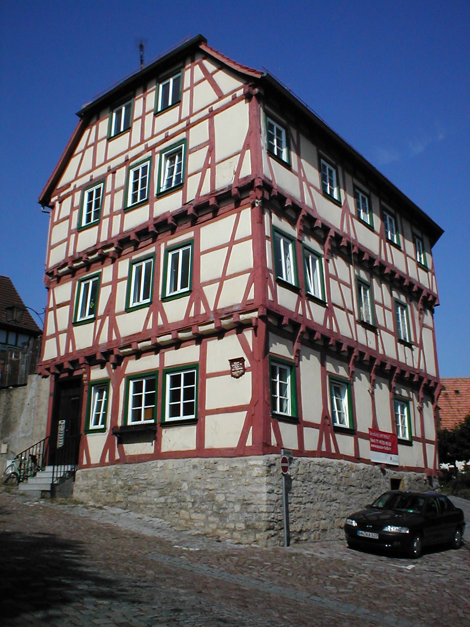 Stadthaus der Herren von Ehrenberg in Bad Wimpfen, entstanden im 15. Jhd.